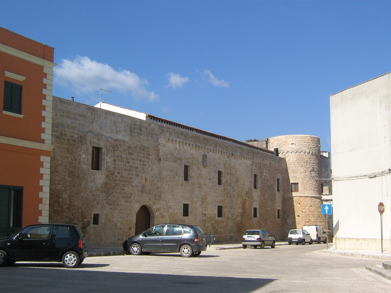 Acquarica del Capo Castello